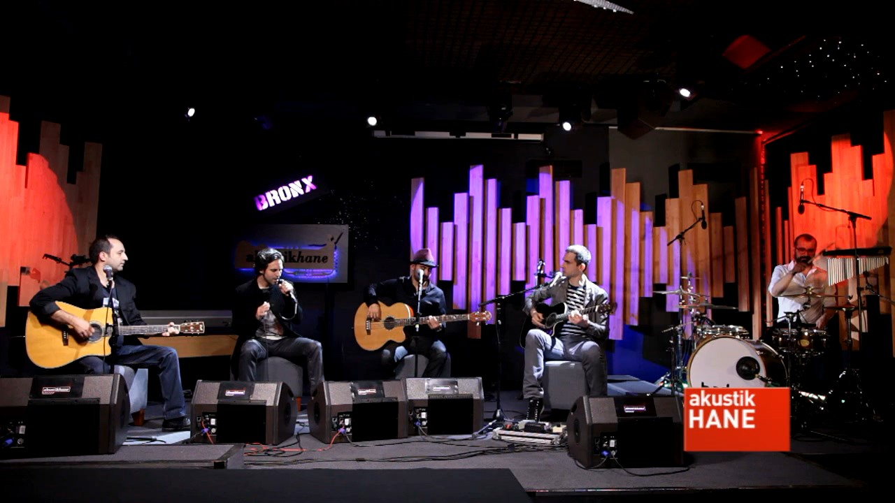 Akustikhane'de Badem (müzik grubu)